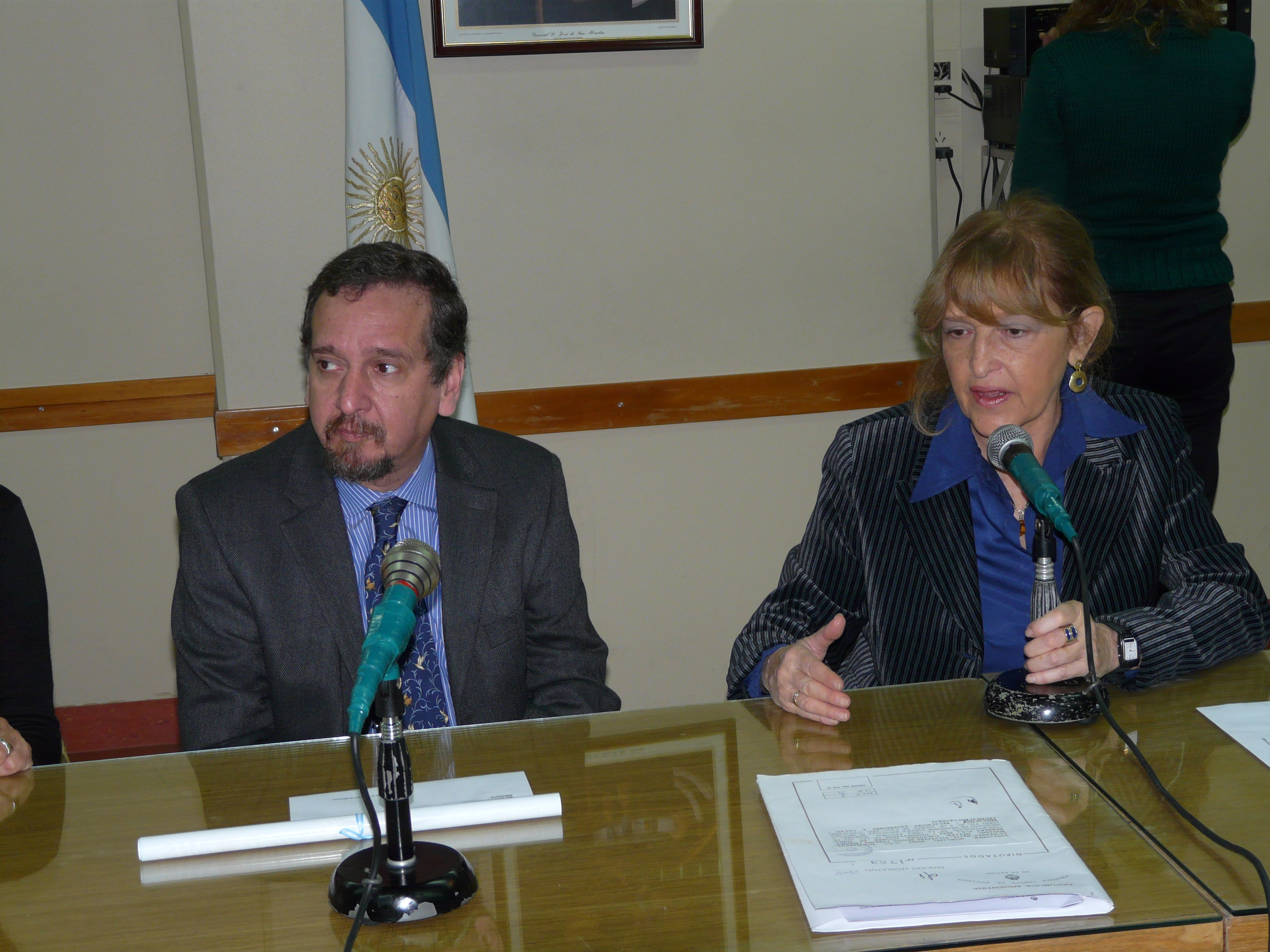 Ministro de Ciencia, Tecnología e Innovación Productiva de la República Argentina Lino Barañao y Diputada Nacional Adriana Puiggrós